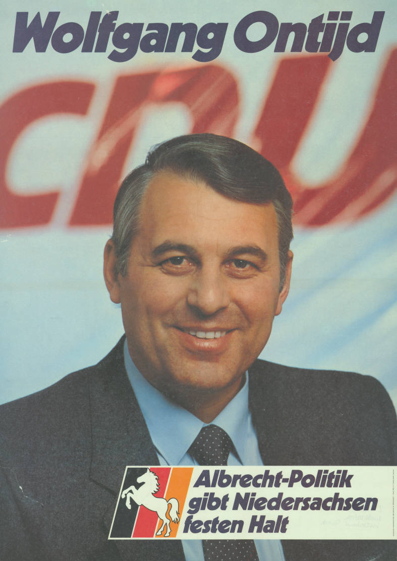 Wolfgang Ontijd CDU Albrecht-Politik gibt Niedersachsen festen Halt Abbildung: Porträtfoto - Nationalfarben mit Niedersachsenross Plakatart: Kandidaten-/Personenplakat mit Porträt Auftraggeber: Verantw.: Niedersachsen-CDU, Hannover Drucker_Druckart_Druckort: Willy F.P. Fehling GmbH, Hannover Objekt-Signatur: 10-008 : 499 Bestand: Landtagswahlplakate Niedersachsen (10-008) GliederungBestand10-18: Landtagswahlplakate Niedersachsen (10-008) » CDU Lizenz: KAS/ACDP 10-008 : 499 CC-BY-SA 3.0 DE